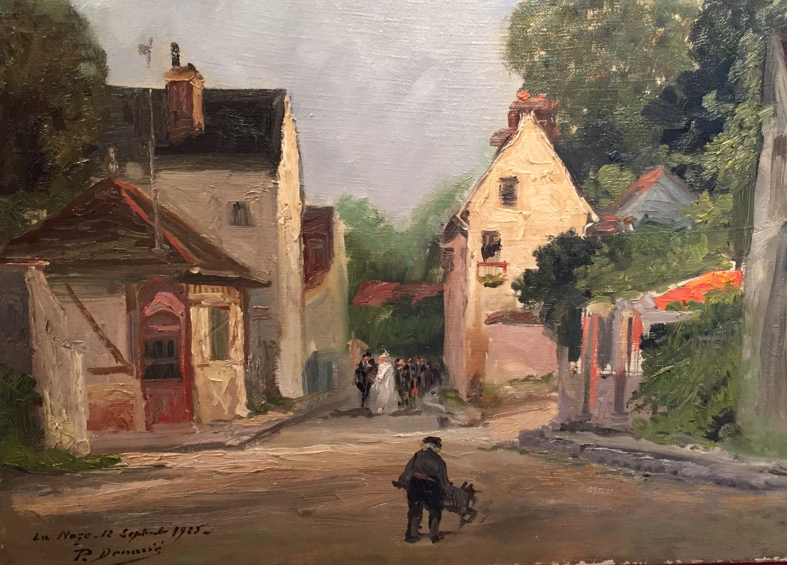 La noce à La Nazé, huile sur toile, signée en bas à gauche, située et datée 1925.